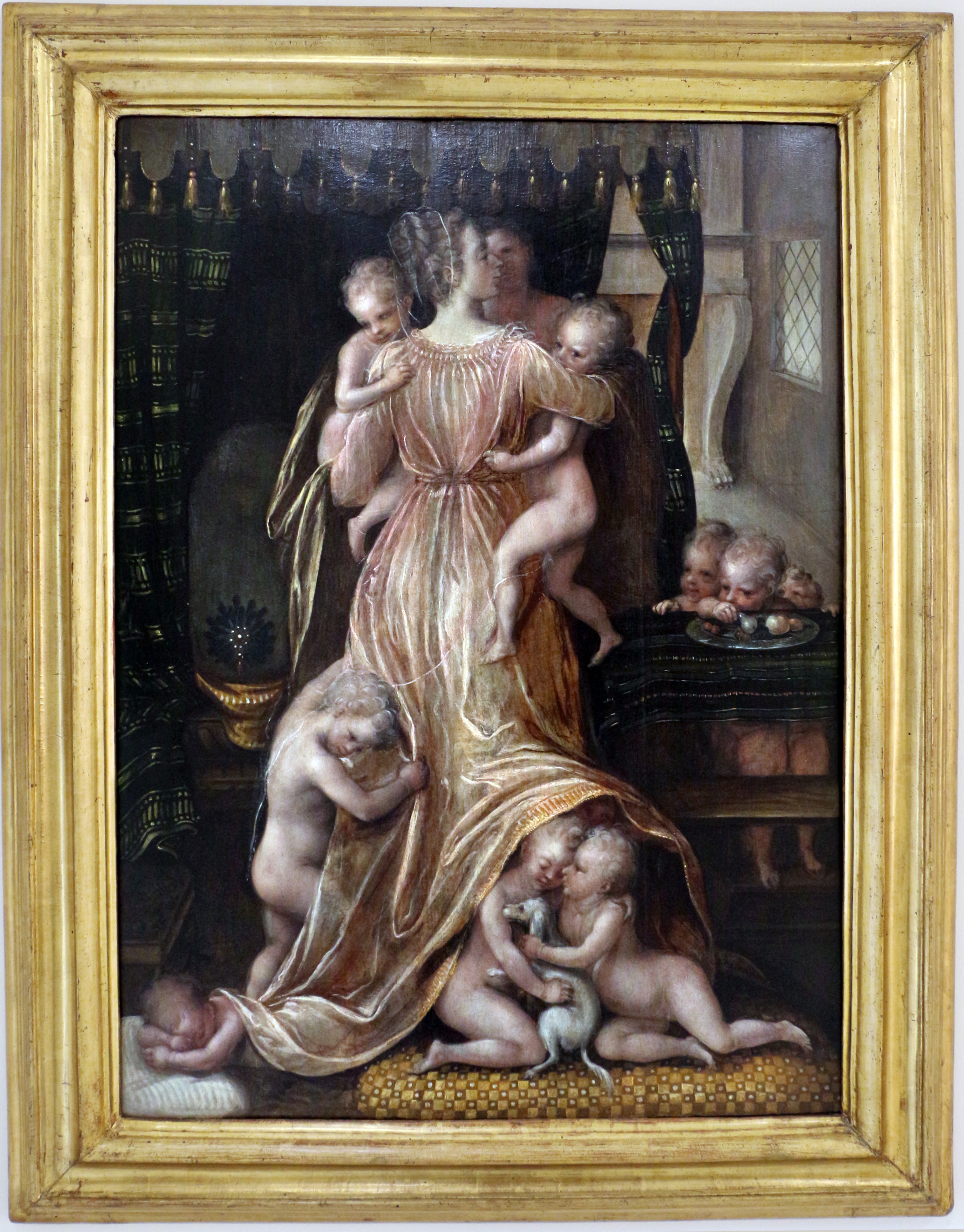 scuola di Fontainebleau